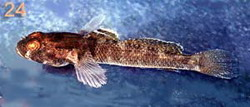 Picture of Zebrus zebrus